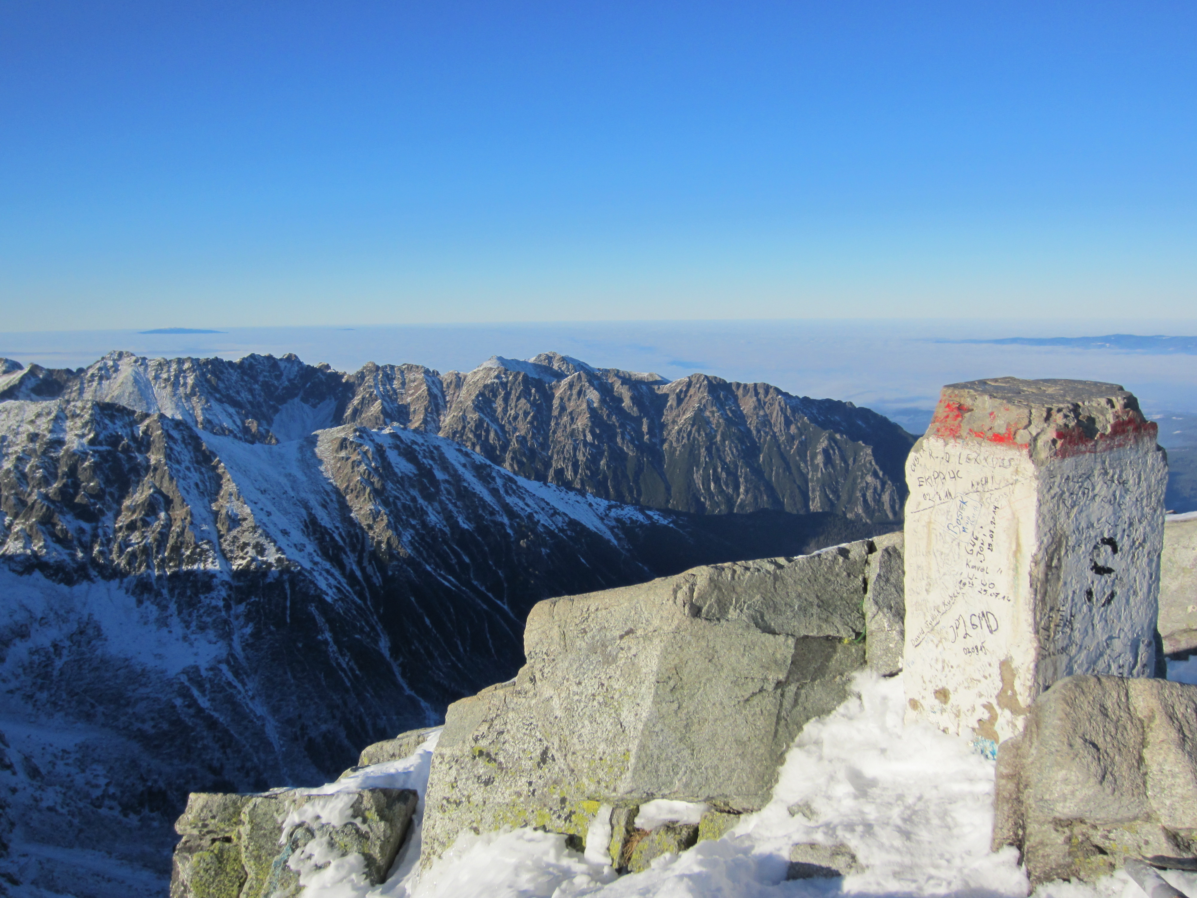 Výhľad z vrcholu Rysov